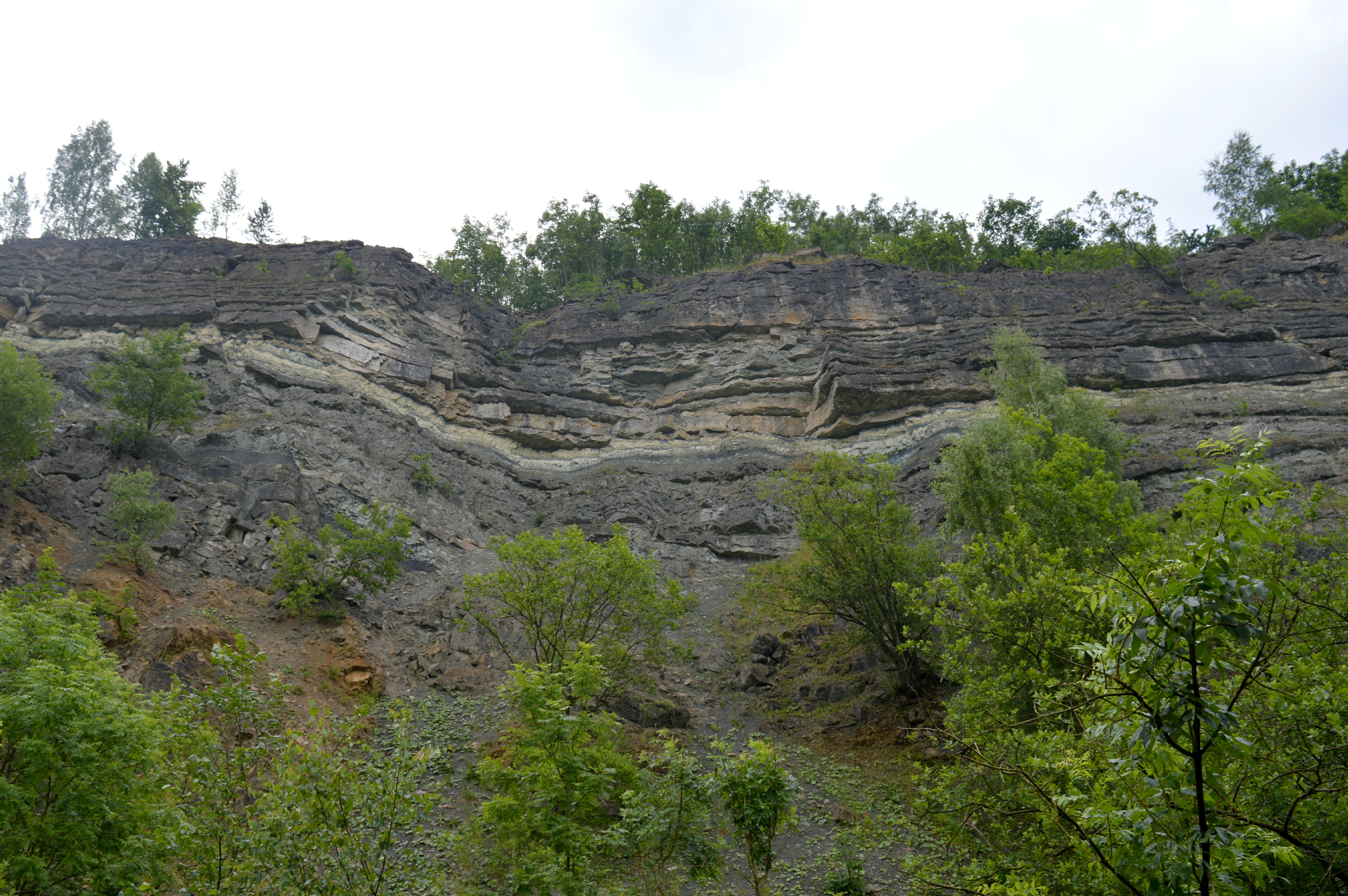 Naturschutzgebiet Steinbruch Holzmühle (26)